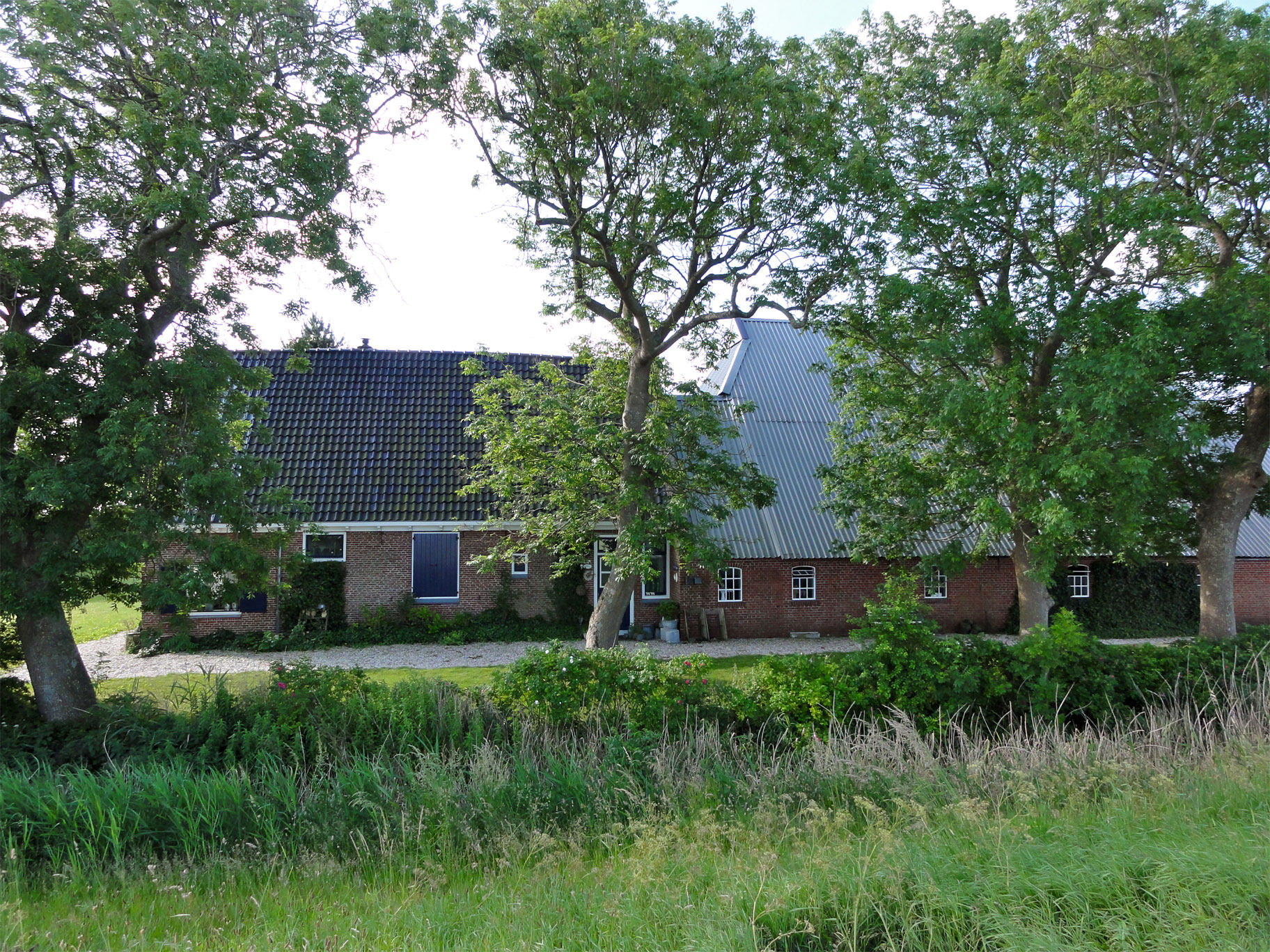 Oudebildtdijk 1115 in Sint-Jacobiparochie